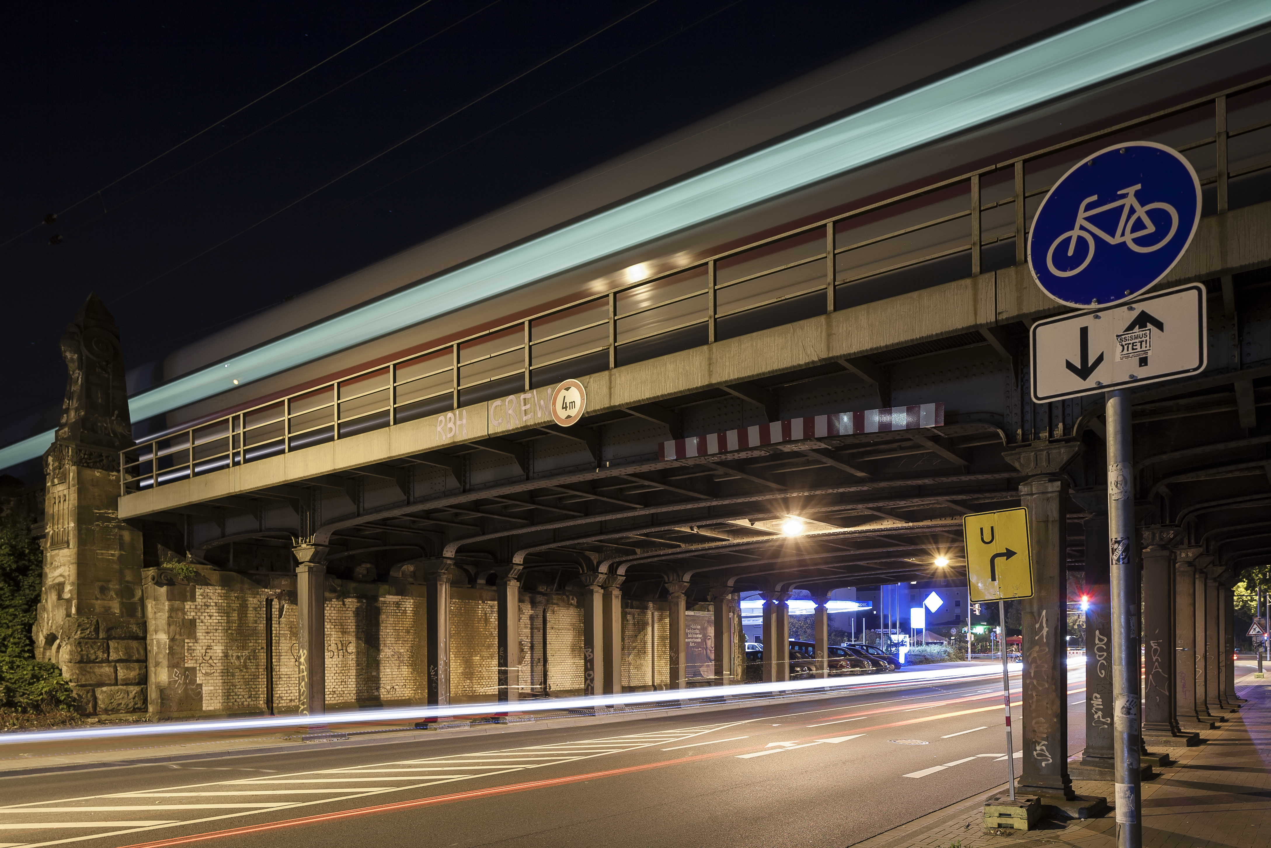 Eisenbahnbrücke über den Altenbekener Damm. Die Bahngleise gehören zu der Nord-Süd-Strecke, die Hannover mit Würzburg verbindet.